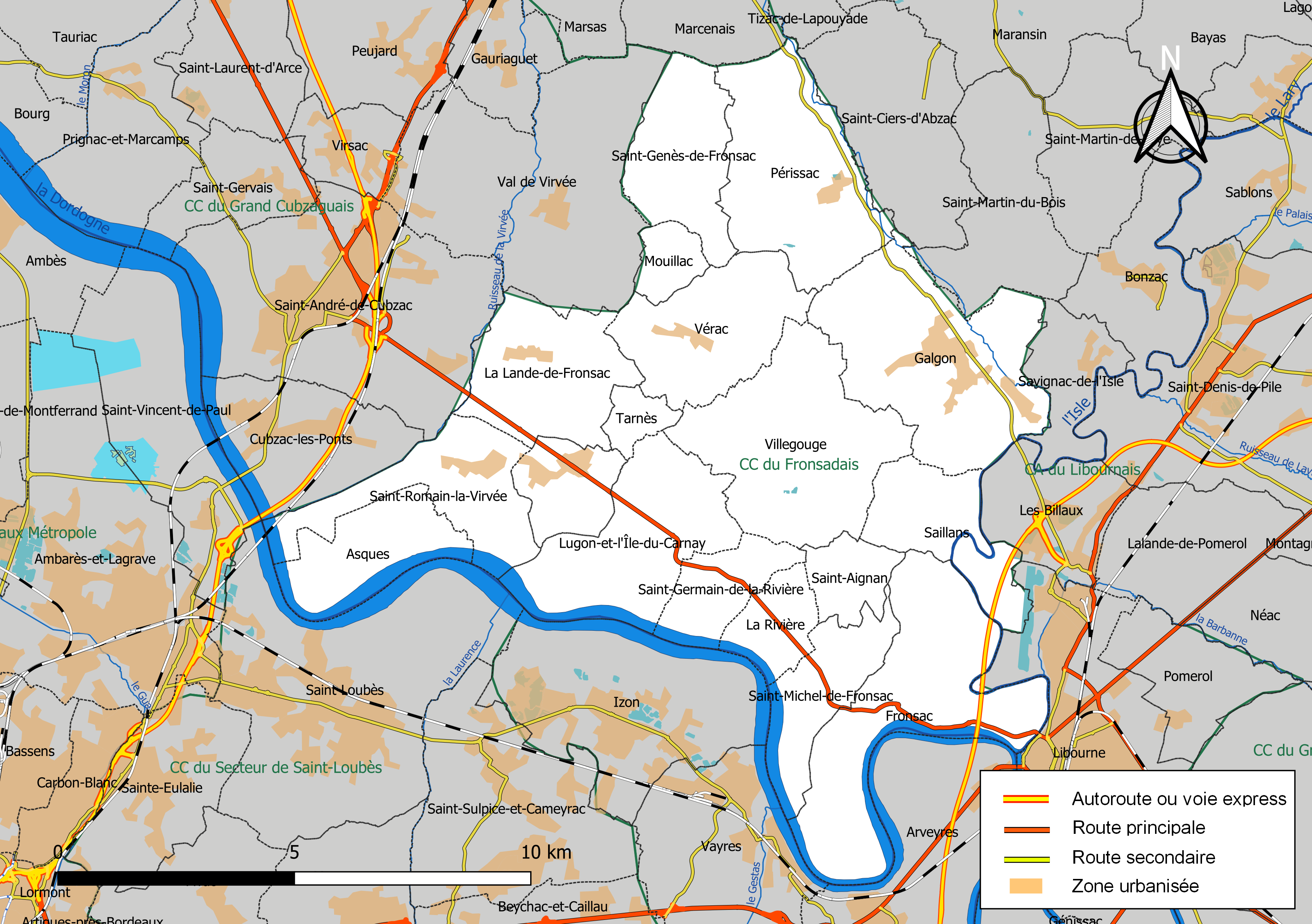 Carte géographique de la Communauté de communes du Fronsadais, département de la Gironde, France. Composition au 1er janvier 2019.